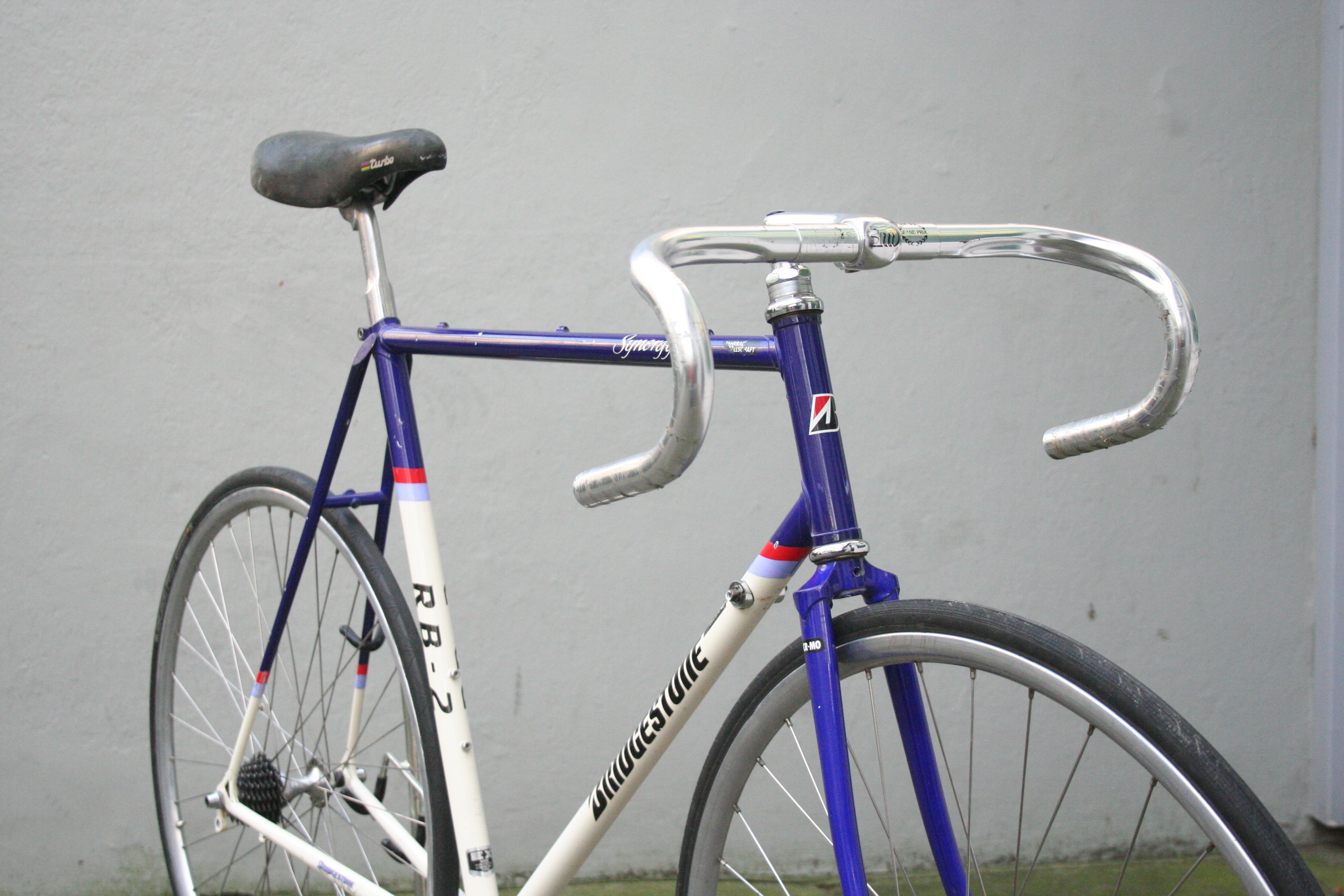 Bridgestone RoadBike 2 Frame